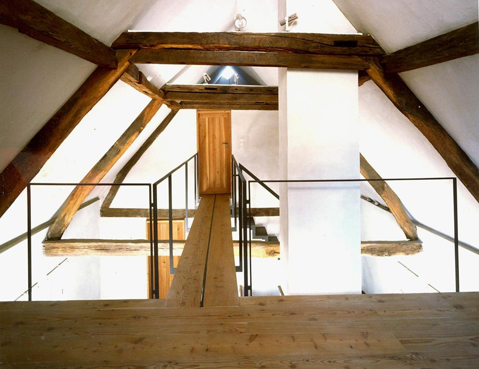 Denkmalgeschütztes Fachwerkhaus, Hertersplatz 13, Alfter